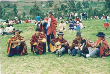 Kañari glazbenici. - Kañari su stari indijanski narod u Kordiljerima južnog Ekvadora. Danas se nose poput Quechua i govore njihov jezik, ali su identitet ipak sačuvali. Njihov quechua jezik danas se naziva 'planinski cañar quechua'. Kañari-Musiker. Kañari takiqkuna. Suradnik:Zeljko-pa rurasqan.